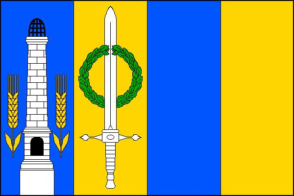 Vlajka obce Mikulášovice